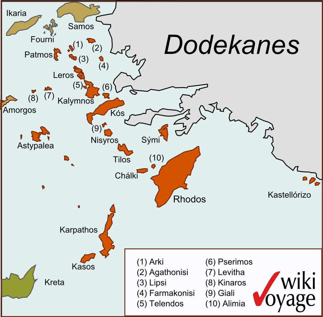 Karte der Inselgruppe Dodekanes